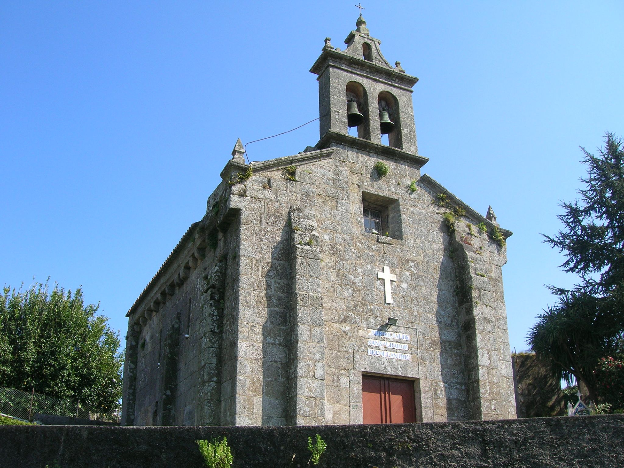 Igrexa de San Salvador de Colantres, Coirós